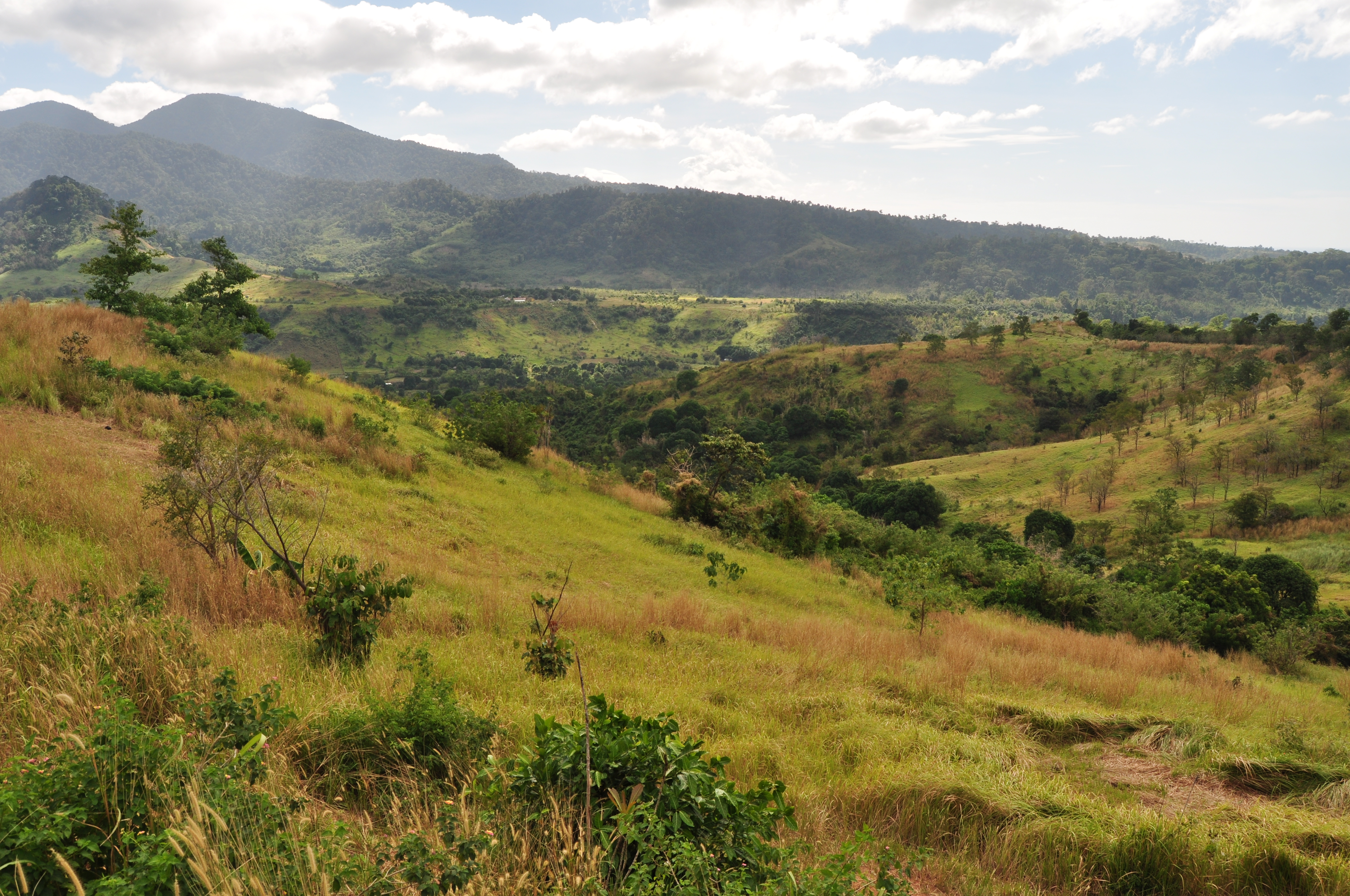 Morong, 2108 Bataan, Philippines